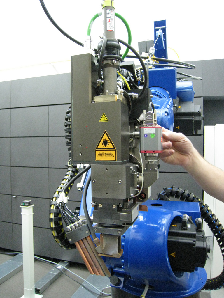 Nd:YAG-laser voor lasersnijden gemonteerd op robot. Bron Metaal Magazine